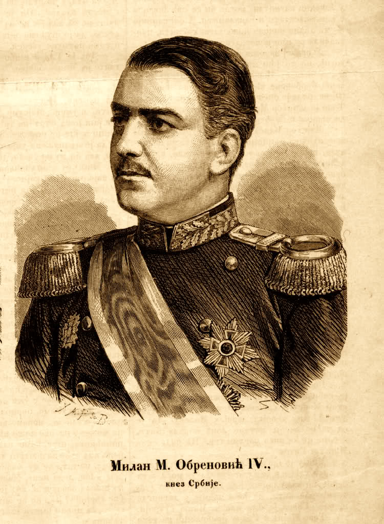 Kralj Milan I Obrenović, prvi kralj Srbije posle kosovskog boja, Naslednik kneza Mihajla Obrenovića i otac kralja Aleksandra Obrenovića